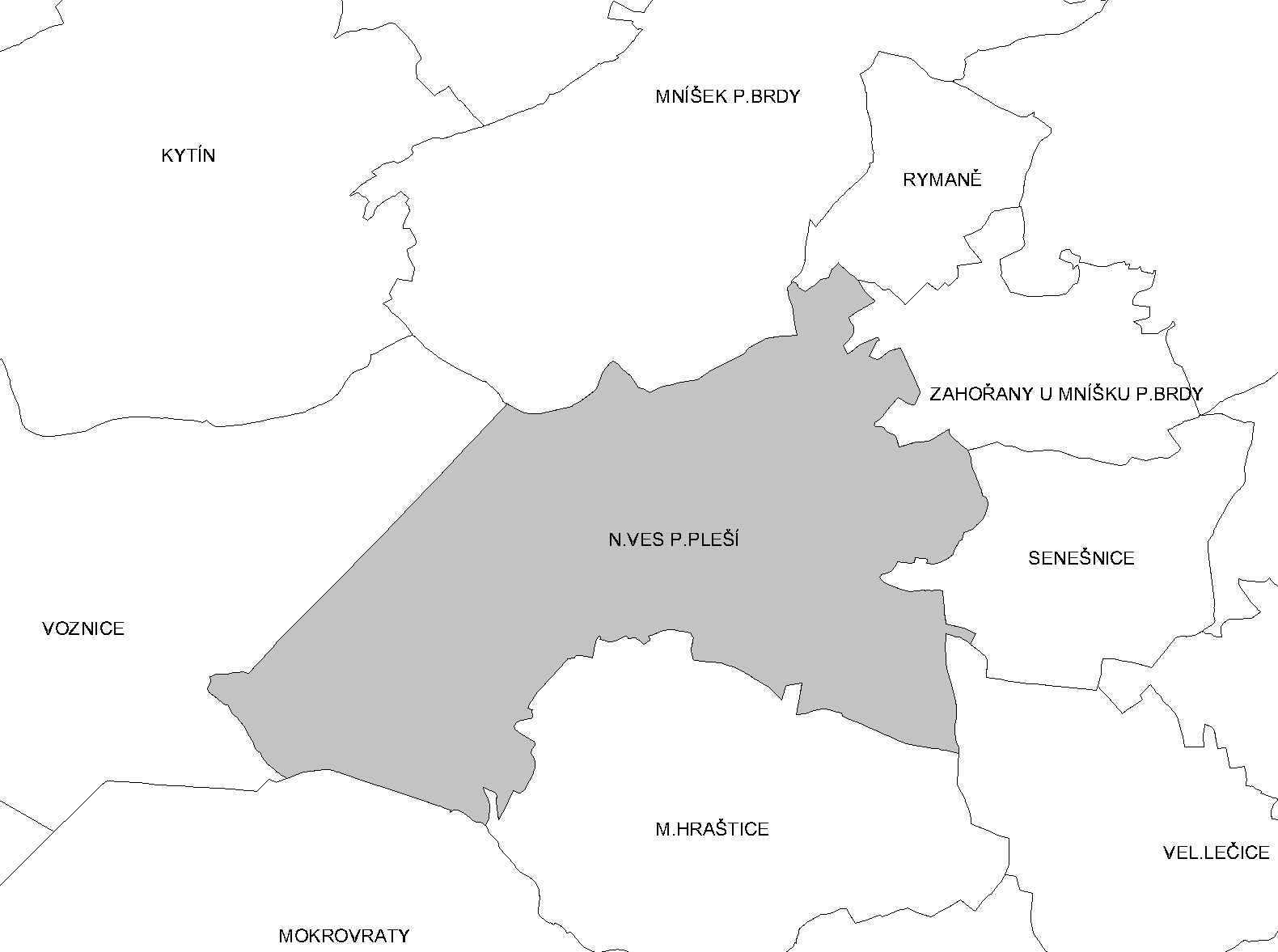 Katastr Nové vsi p/P